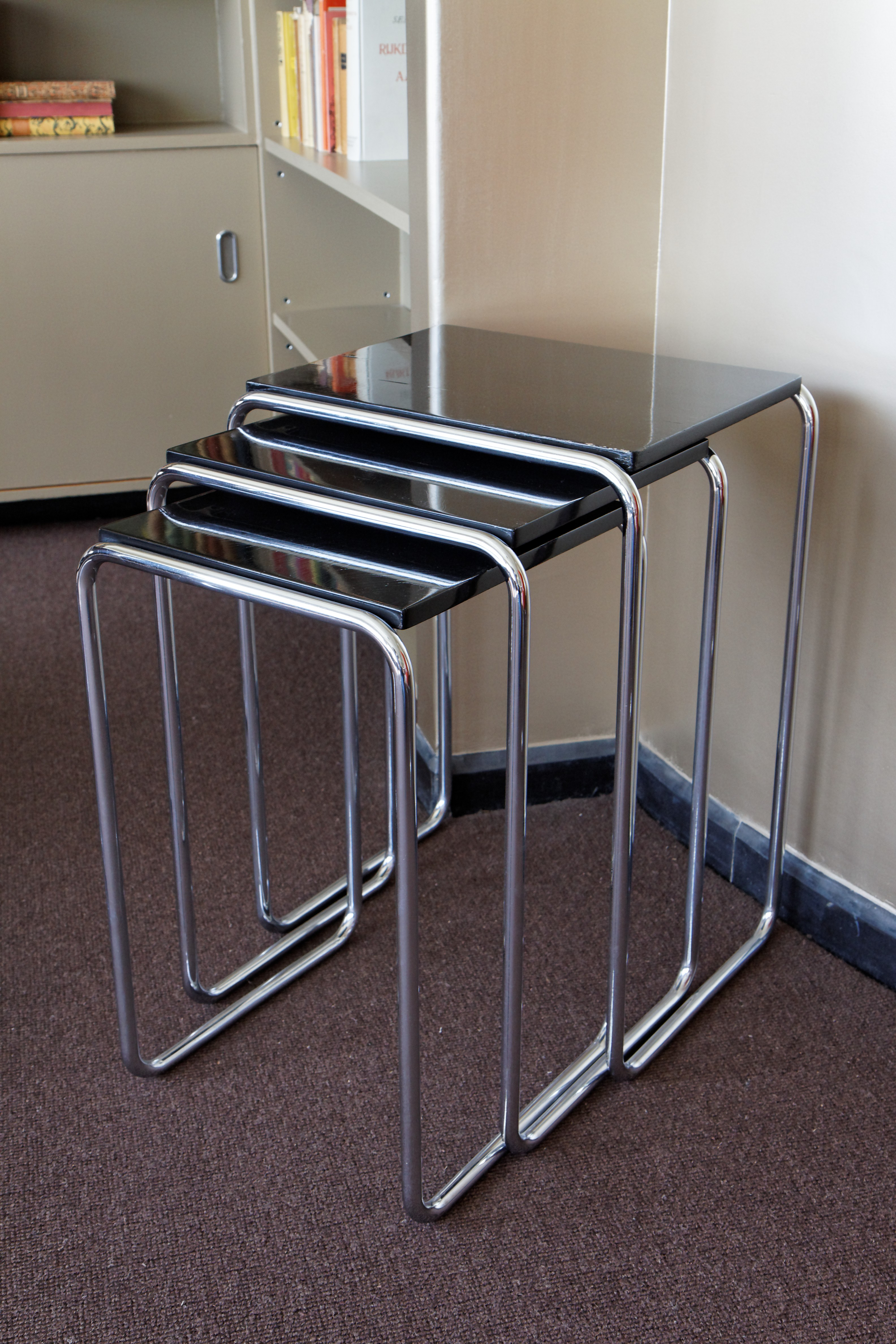 Titel: Bijzettafeltjes Gispen 23 Jaar: 1933 Ontwerper: W.H. Gispen Omschrijving: Set van drie bijzettafeltjes van zwart gelakt triplex en een onderstel van verchroomd metalen buis. Collectie: NAi Objectnummer: 23 Tag: 24021 Titel: Bijzettafeltjes Gispen 23 Jaar: 1933 Ontwerper: W.H. Gispen Omschrijving: Set van drie bijzettafeltjes van zwart gelakt triplex en een onderstel van verchroomd metalen buis. Collectie: NAi Objectnummer: 23 090621-152915_ 0445_50D_raw